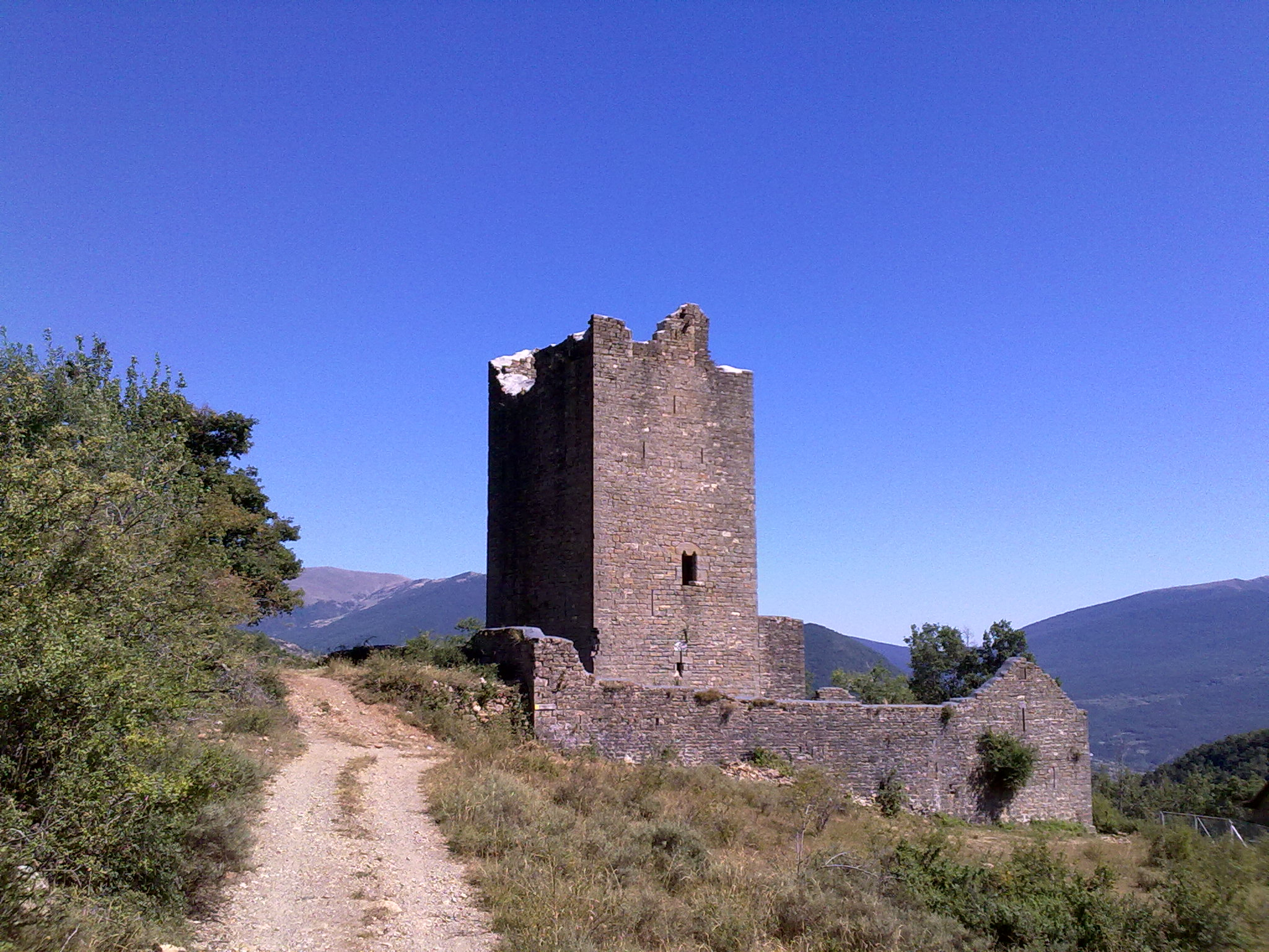 Fotografia del lateral esquerra de la Torraza de Escuer des del camí d'accès